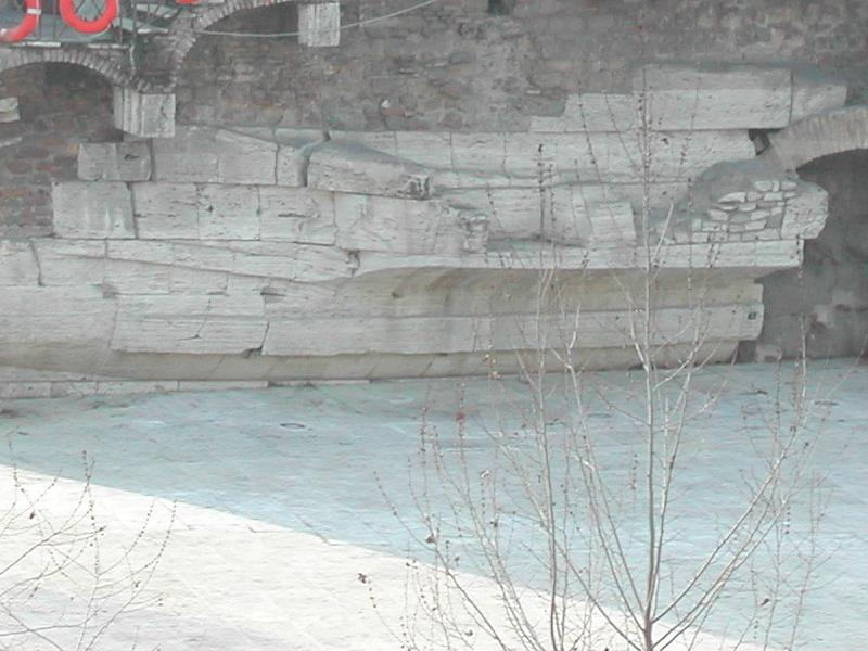 Roma, Isola Tiberina: tracce della barca di pietra romana